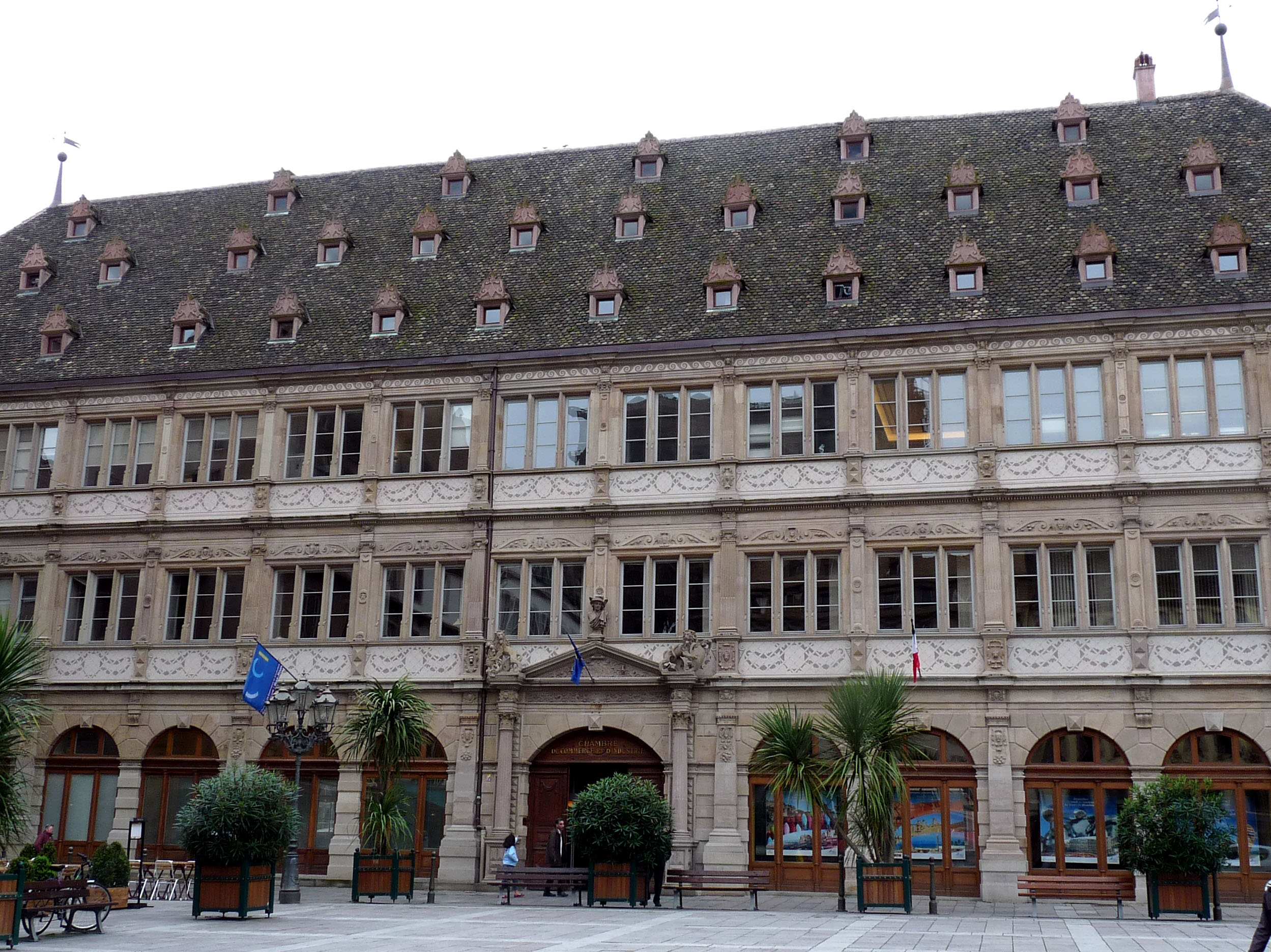 Chambre de Commerce et d'Industrie de Starsbourg, place Gutenberg